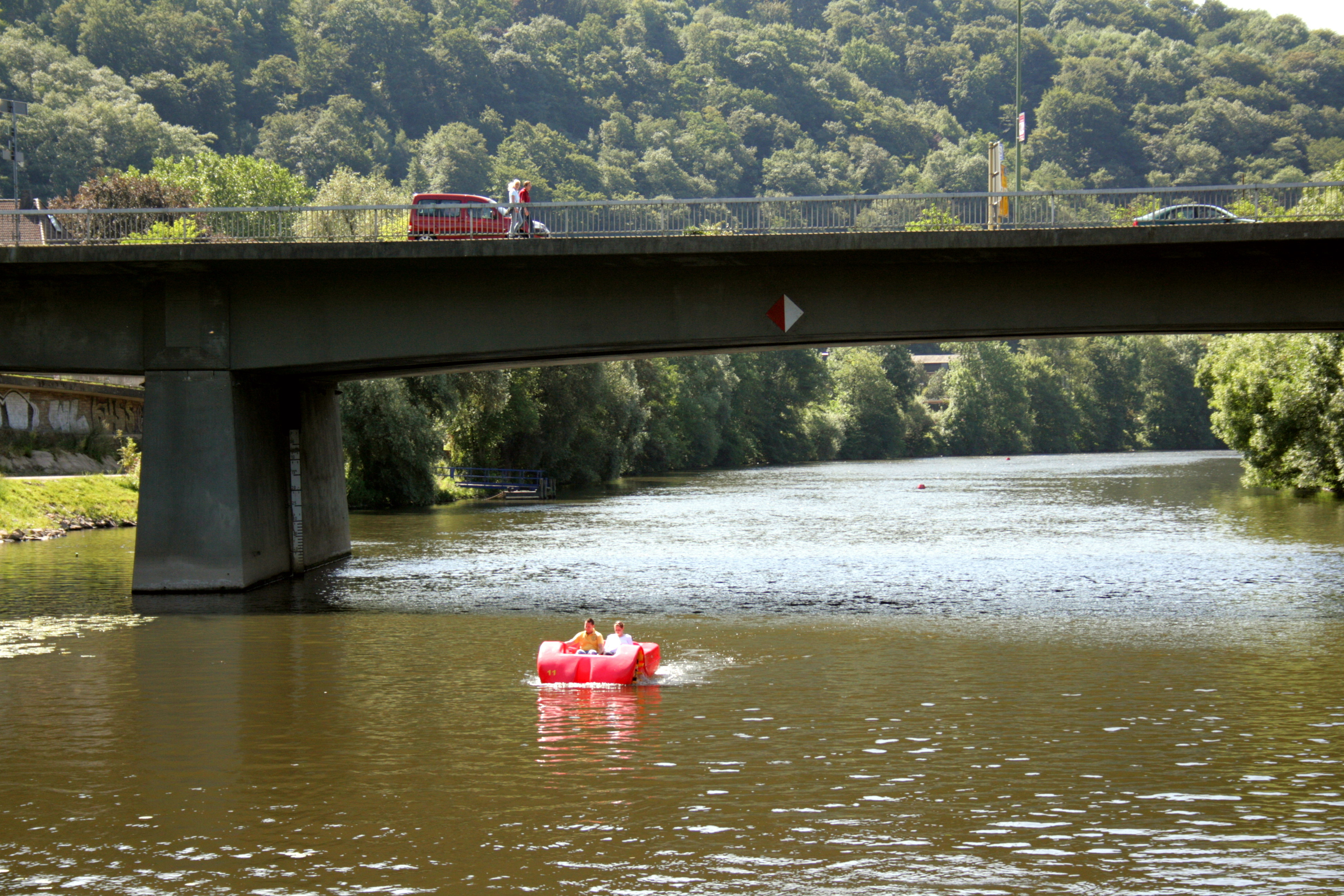 Gustav-Heinemann-Brücke über die Ruhr in Essen-Werden